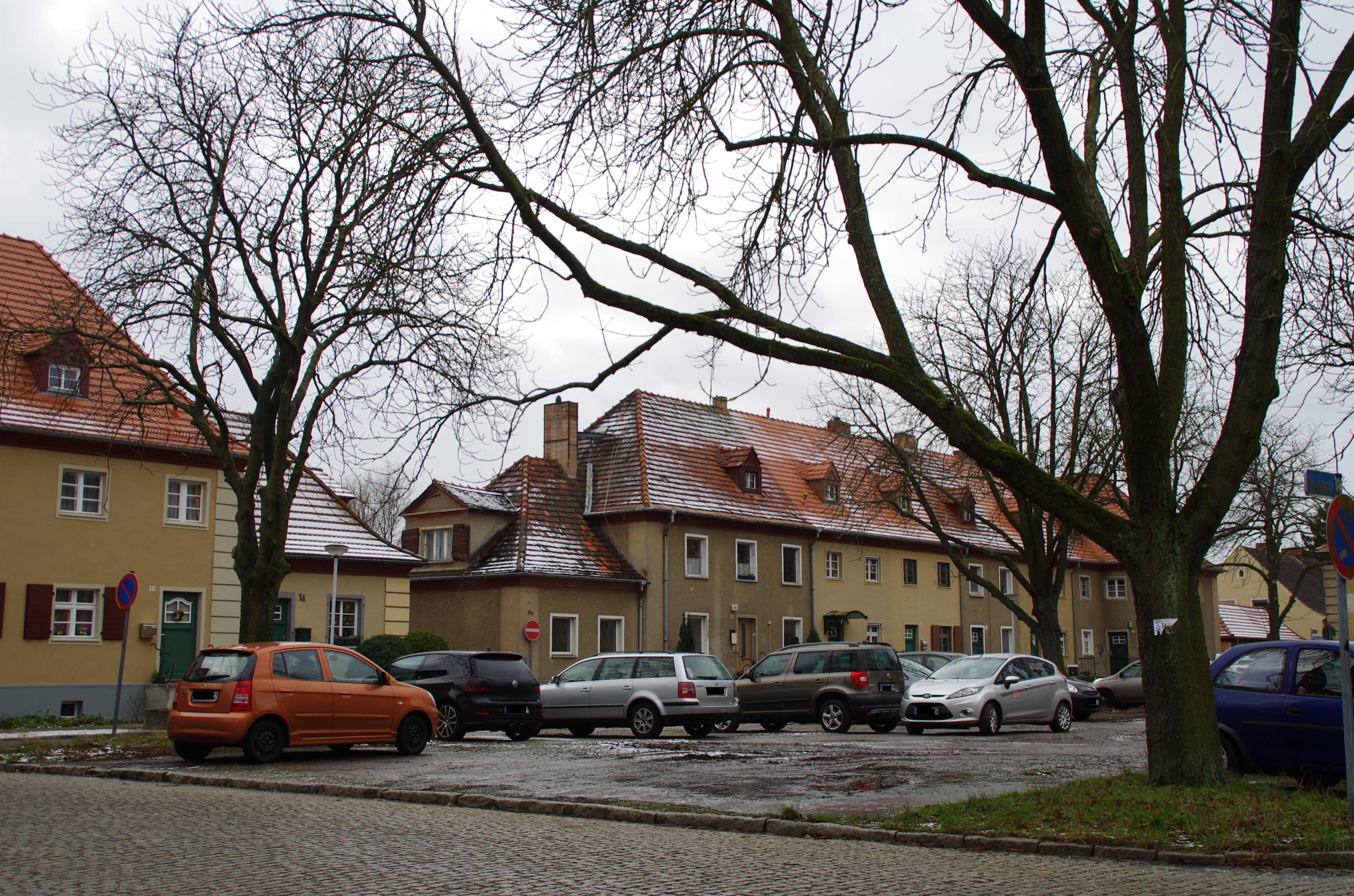 Brandenburg an der Havel Ortsteil Kirchmöser. Die Siedlung Kichmöser West steht unter Denkmalschutz.